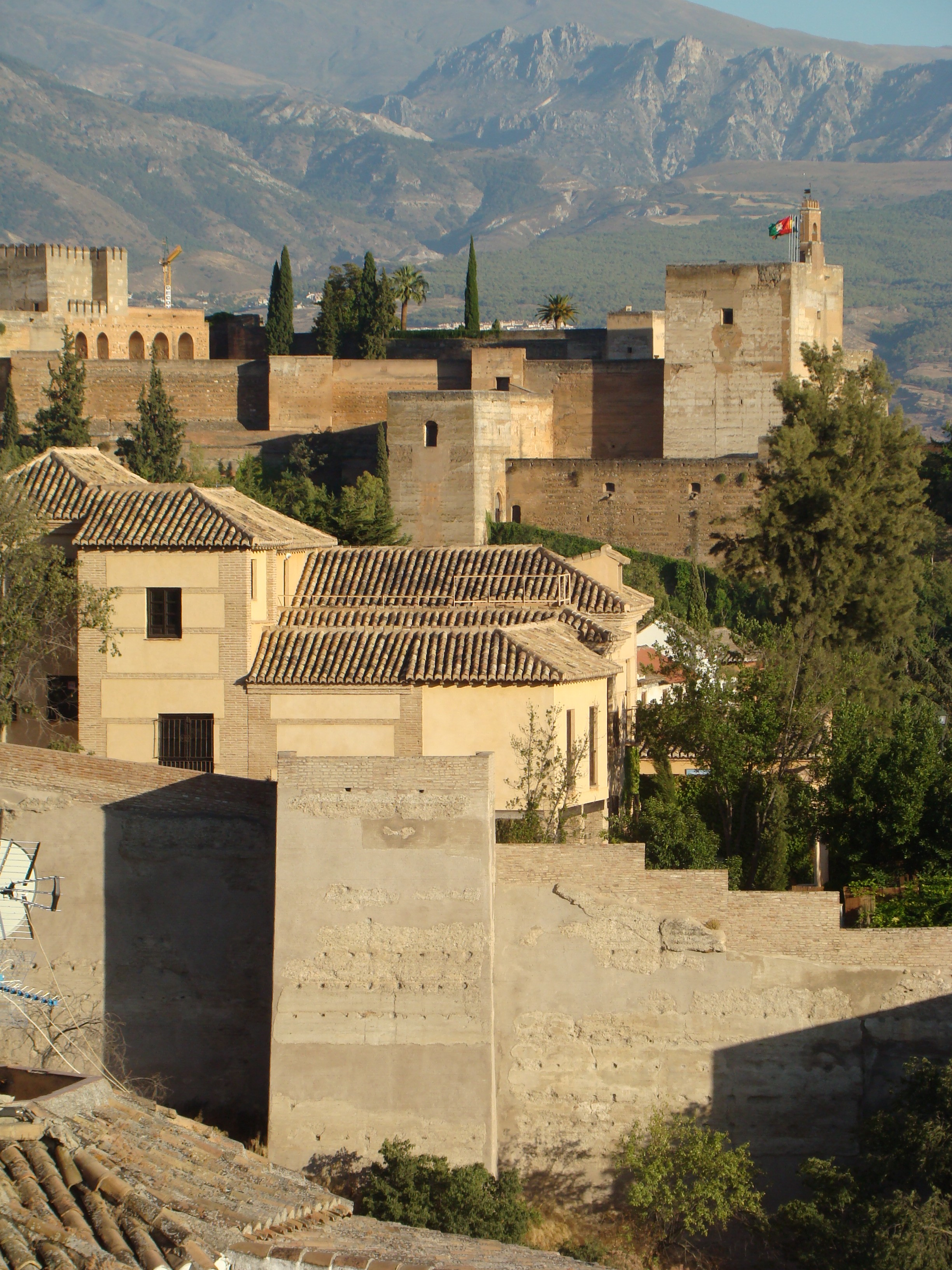 Vista de las dos alcazabas de Granada, la Vieja (al-Qasba Qadima) y la nueva (en la Alhambra)